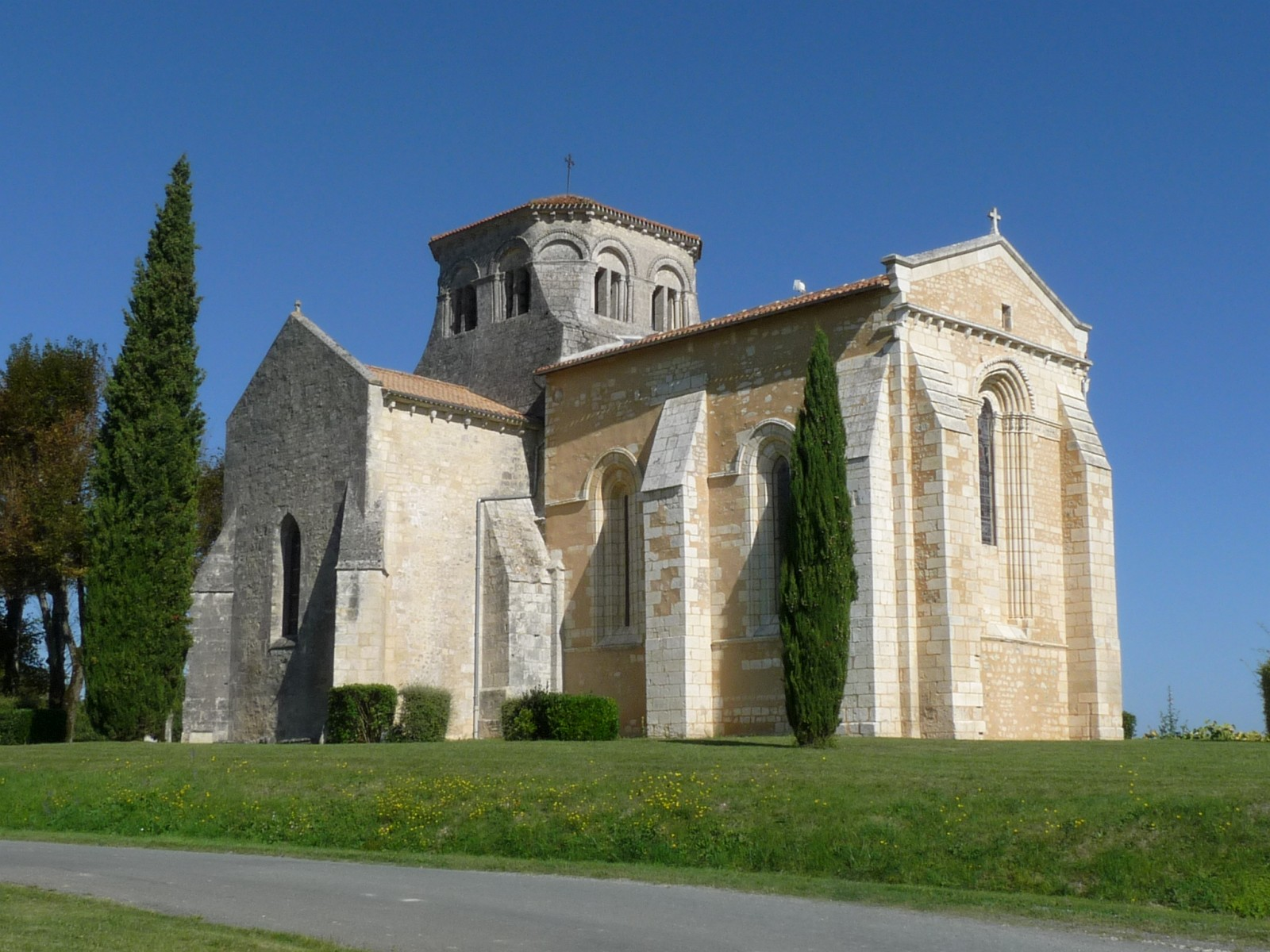 Eglise de St-Eugène, Charente-Maritime, France